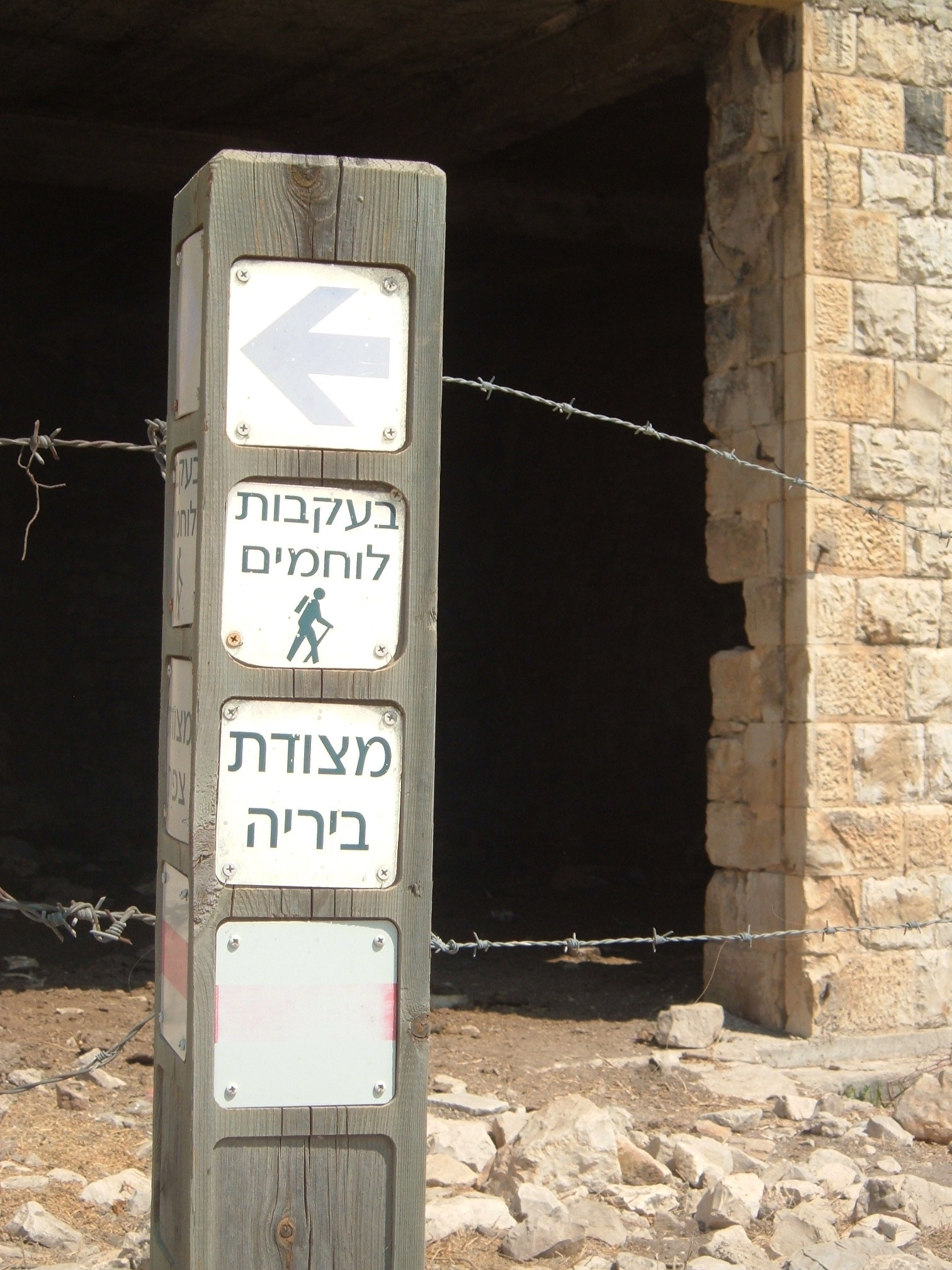 a sign in Eyn Zeytim, on the "Path of warriors" route from Birya to Safed. סימן דרך בעין זיתים, בשביל "בעקבות לוחמים" בין מצודת ביריה ומצודת צפת